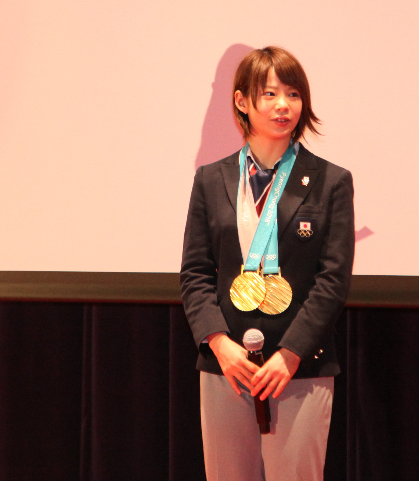 「ふるさと名品 オブ・ザ・イヤー2017」にて